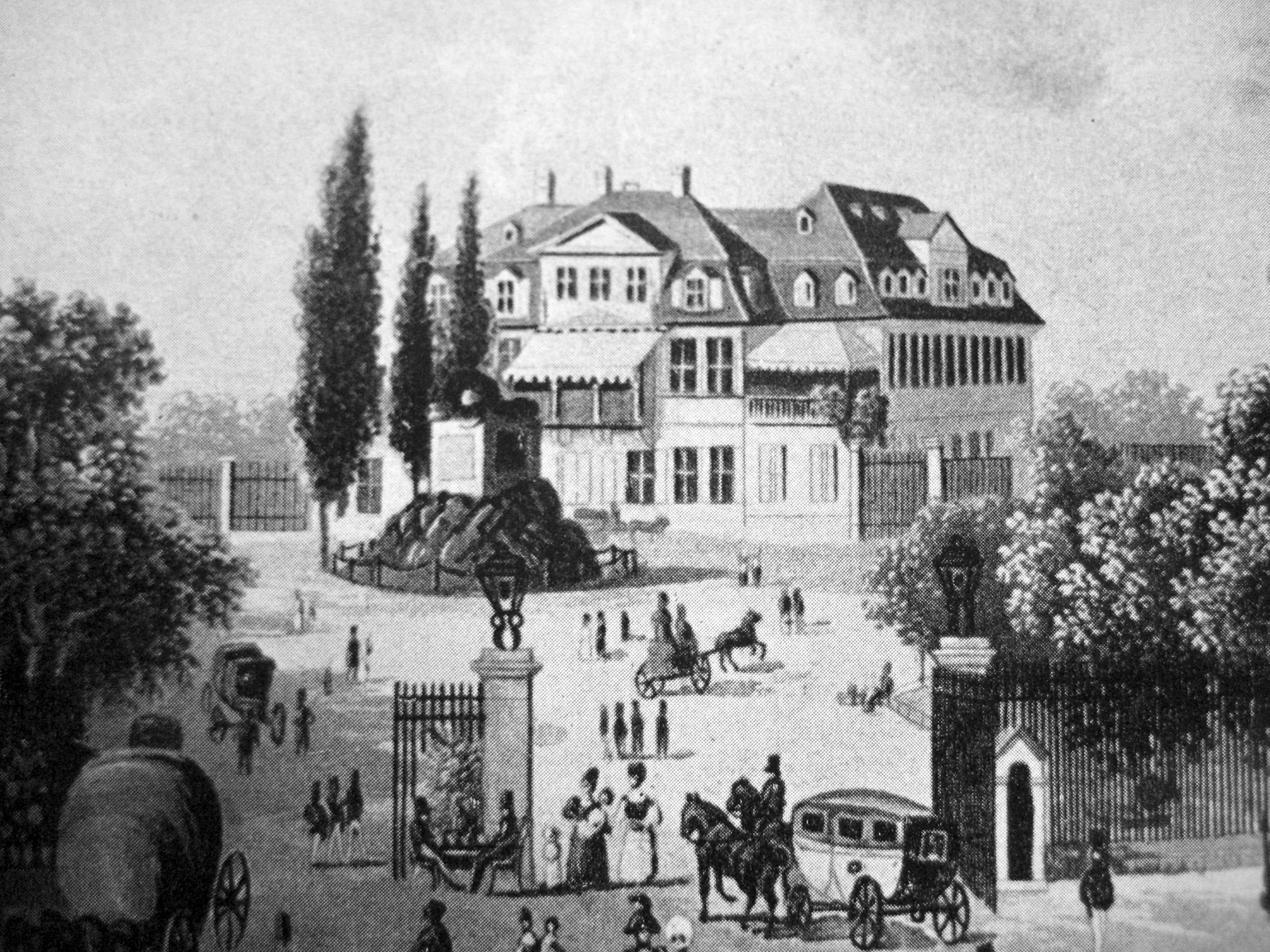 Stich von 1847: Bethmannsches Gartenhaus vor dem Friedberger Tor und dem alten Standort des Hessendenkmals